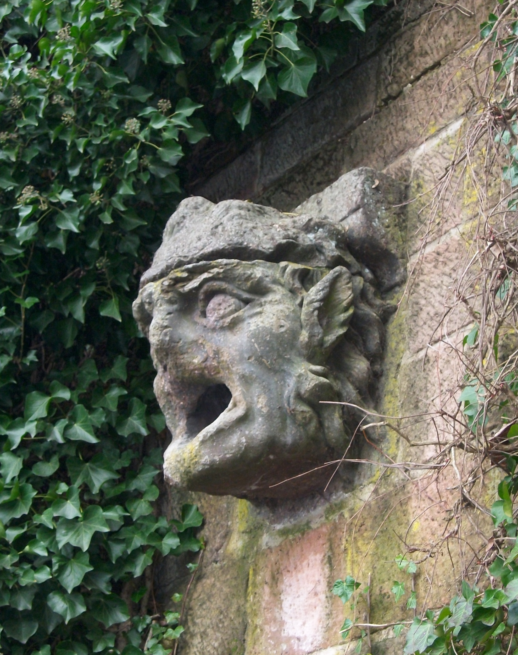 "Der geizige Bäcker", Skulptur an der Schlossmauer Saarbrücken